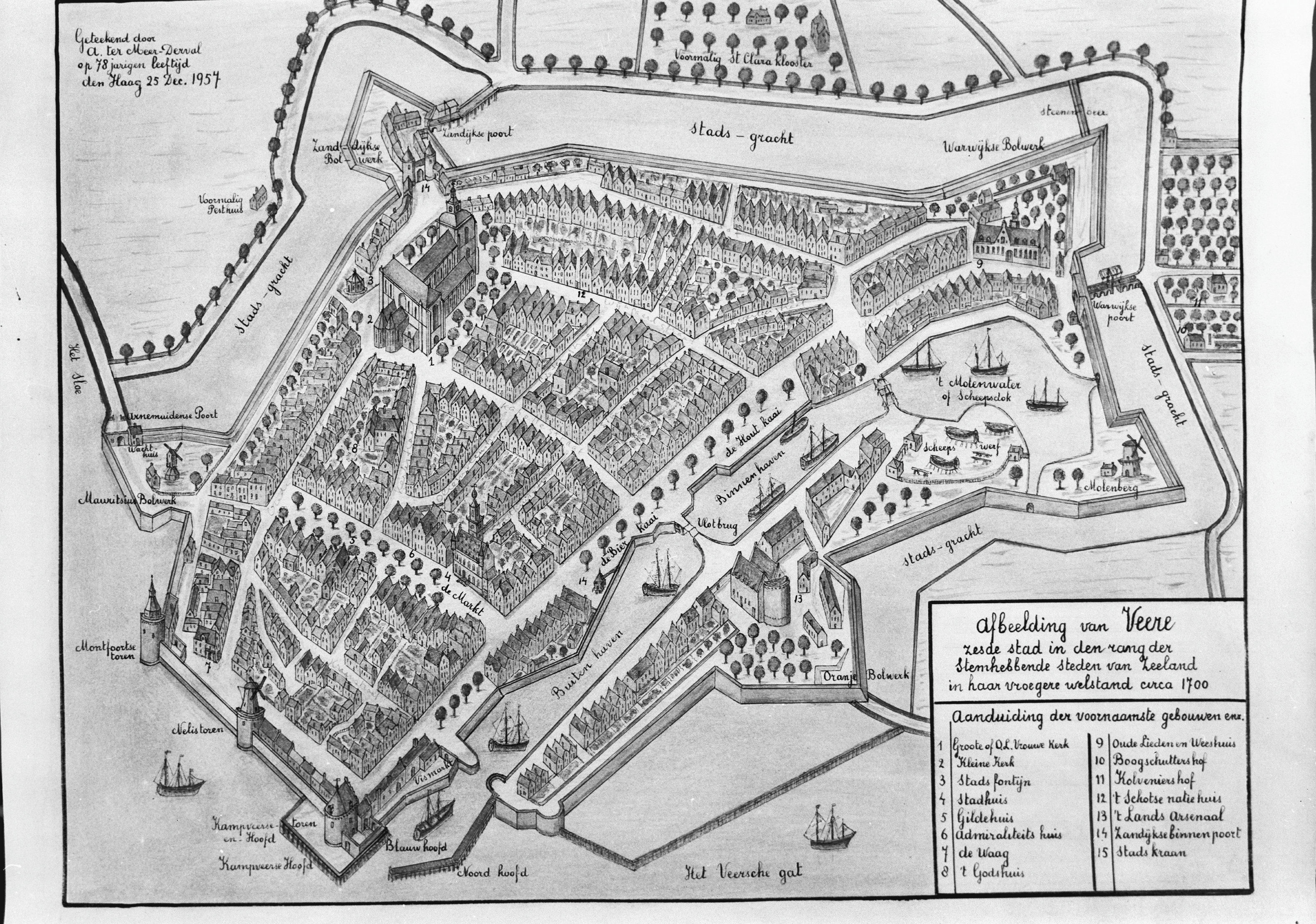 plattegrond ca.1700, tekening Archief Monumenten Zorg